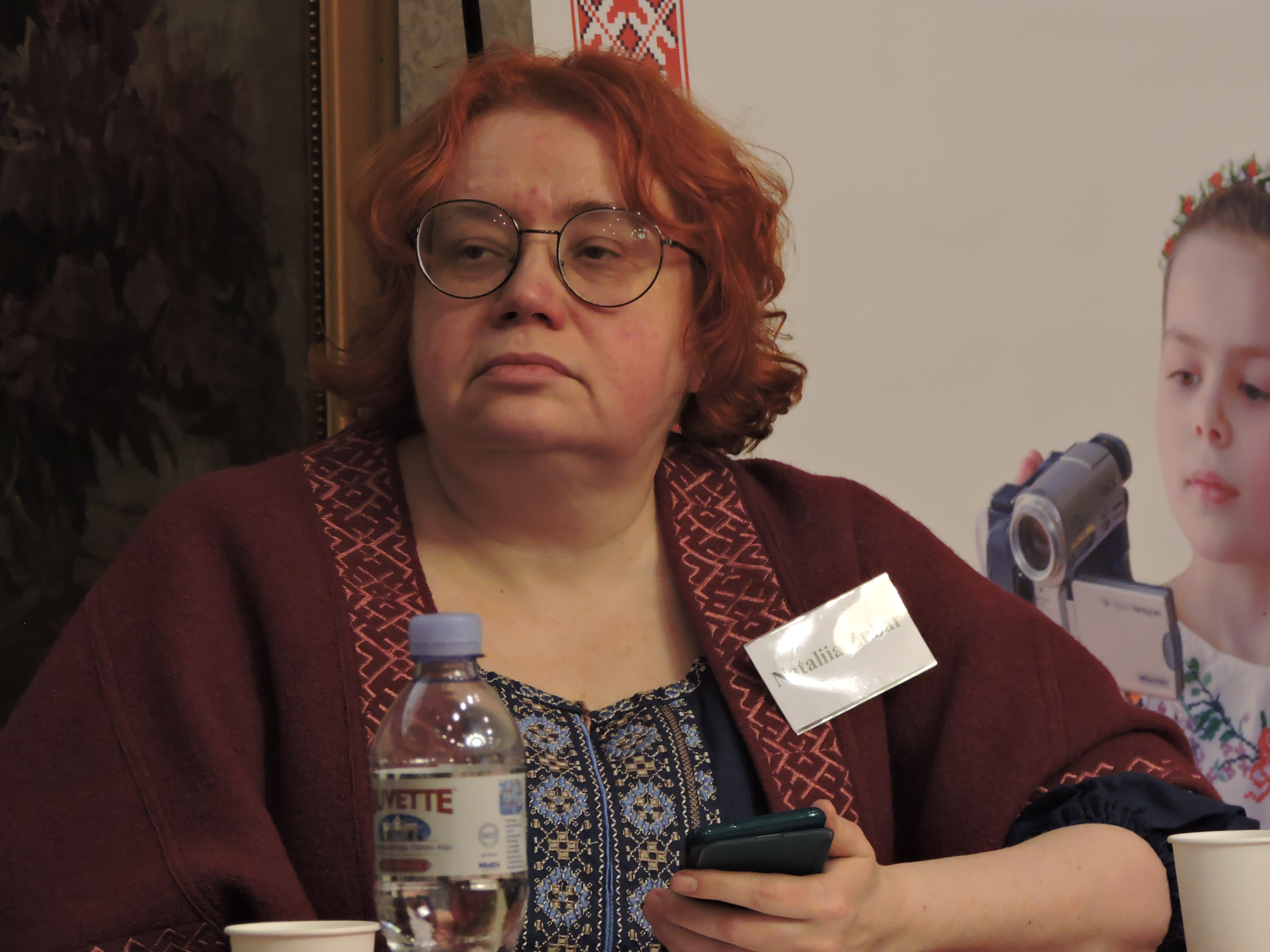 Наталія Зубар, Голова Правління Інформаційного центру «Майдан Моніторинг» під час Другого Харківського Міжнародного Безпекового Форуму (29—30 листопада 2019 року).